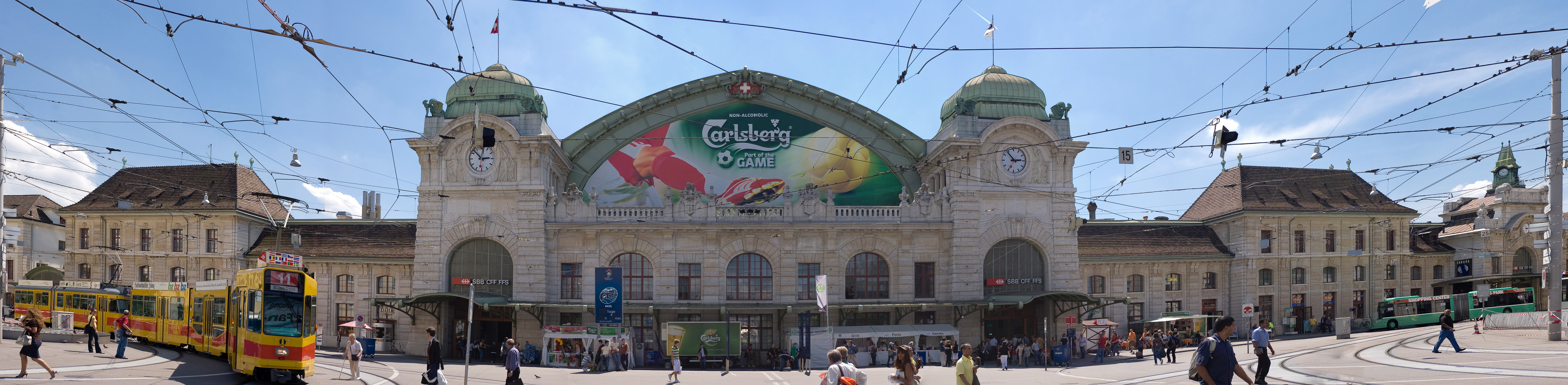 Bahnhof Basel SBB, Switzerland